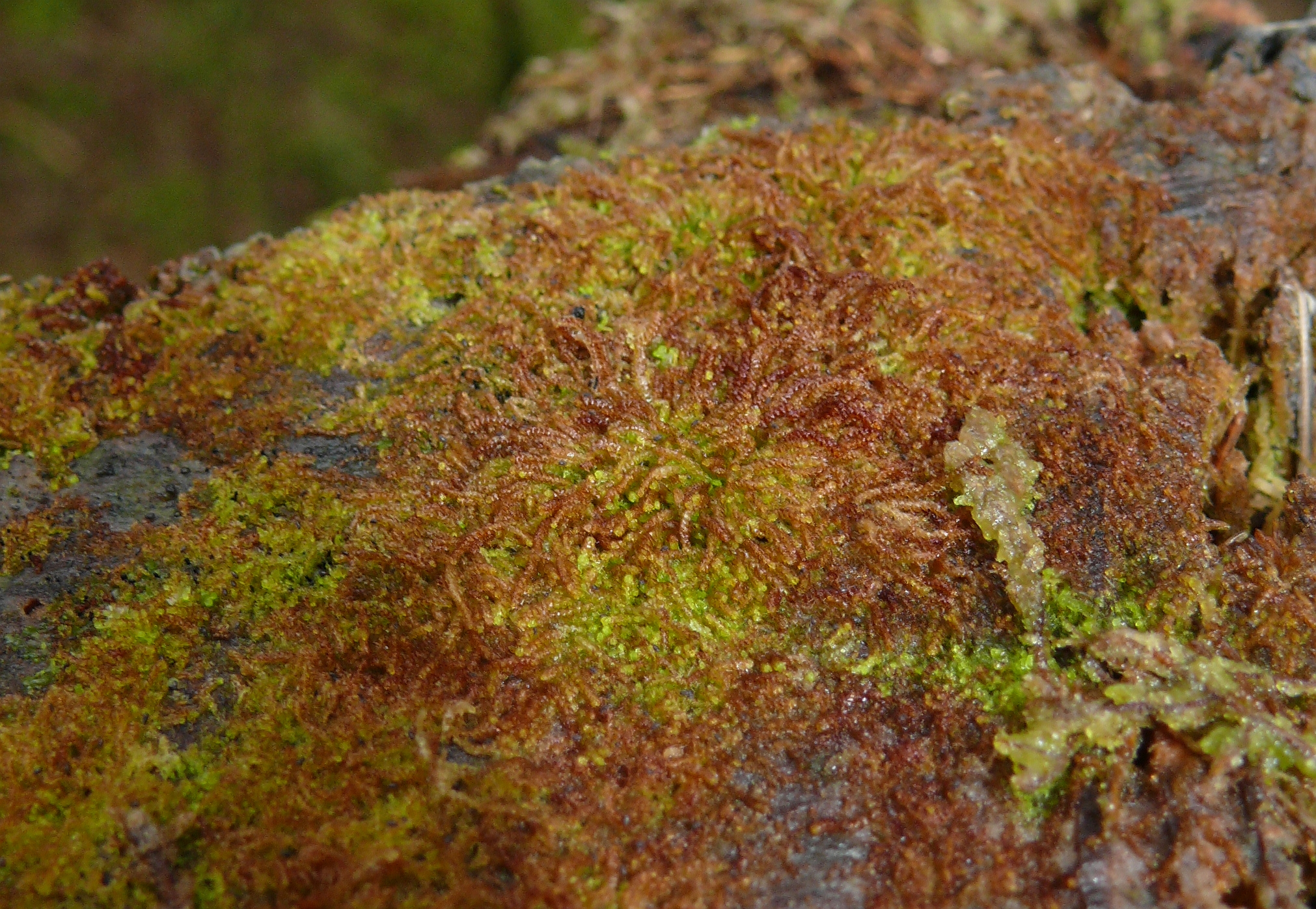 Nowellia curvifolia, Schwäbisch-Fränkische Waldberge, Germany